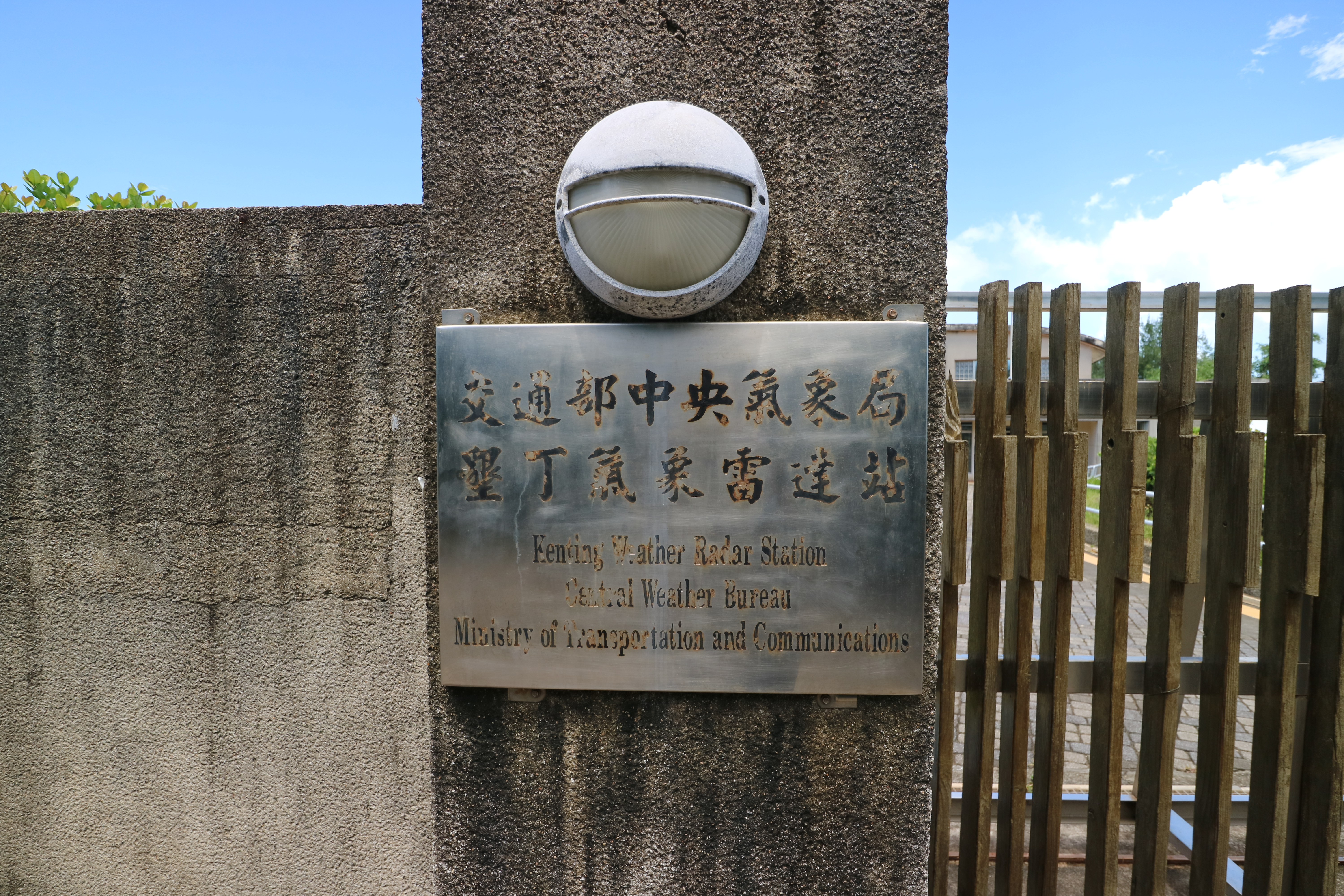 中文（台灣）: 中央氣象局墾丁氣象雷達站門牌